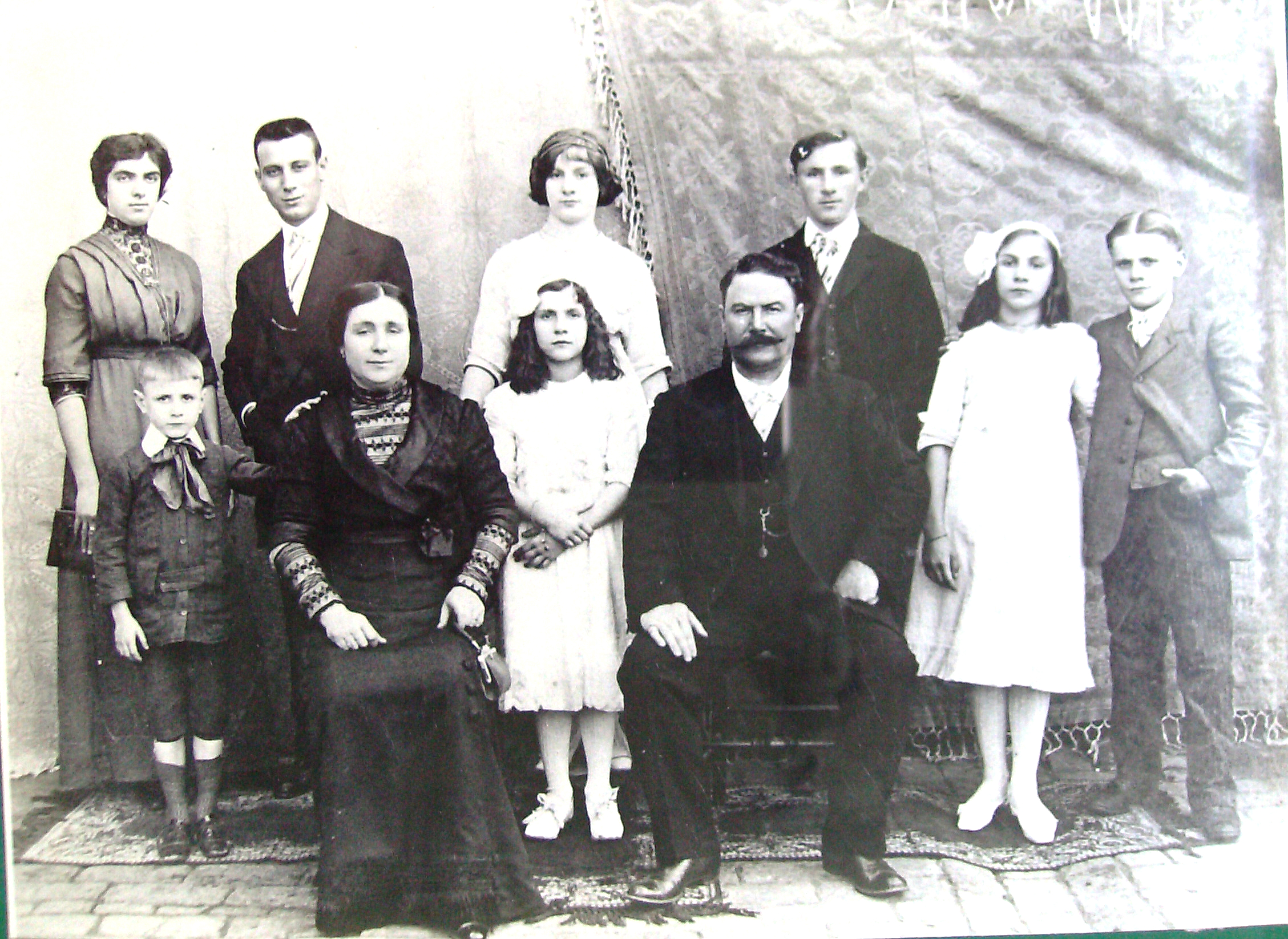 Eliza Pinocchi Picchi, Daniel Picchi e filhos. Acima, da esquerda para direita, Maria Gaspari Picchi e, ao lado, Alberto Picchi.